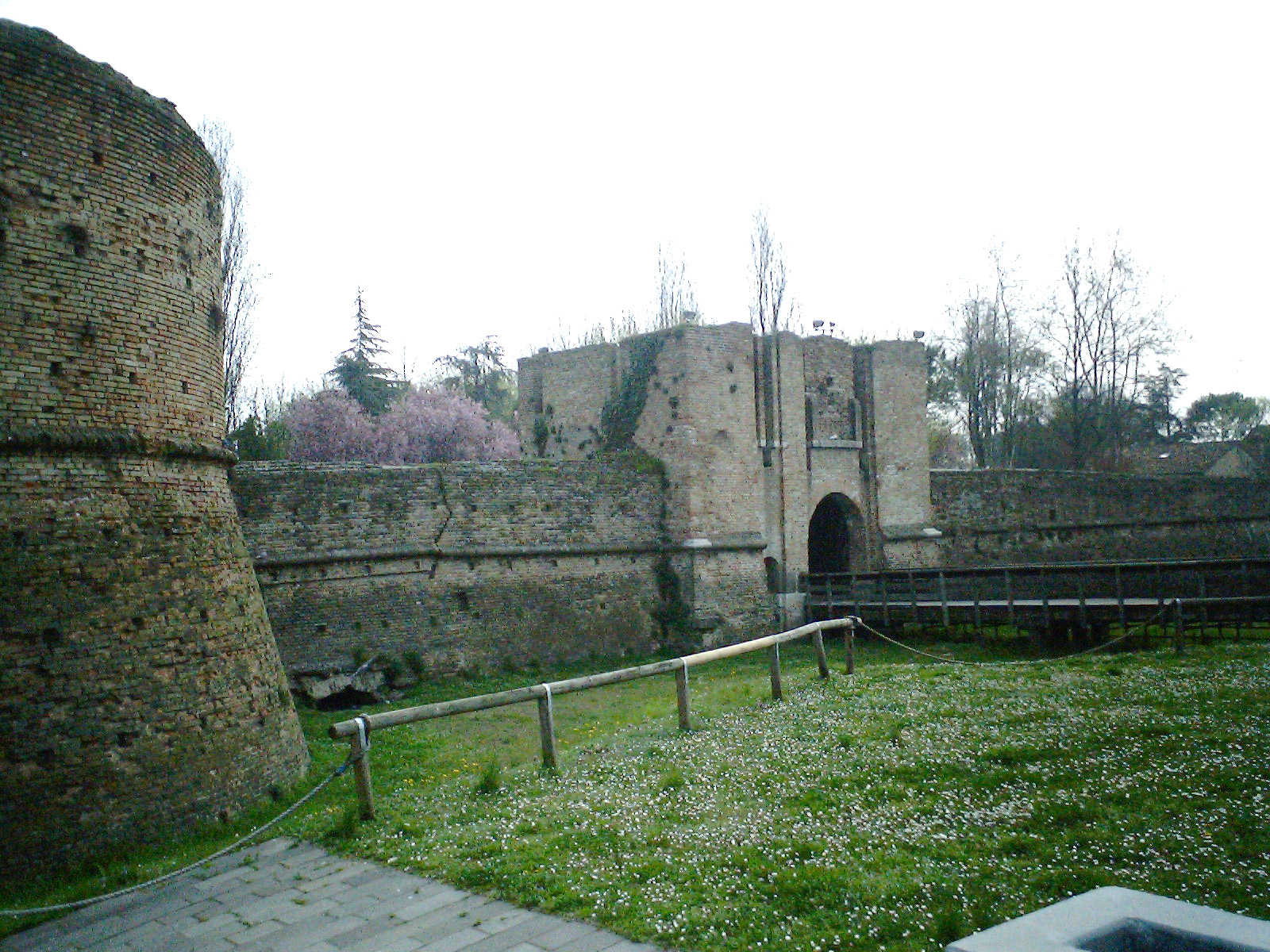 Fortezza Brancaleone in Ravenna